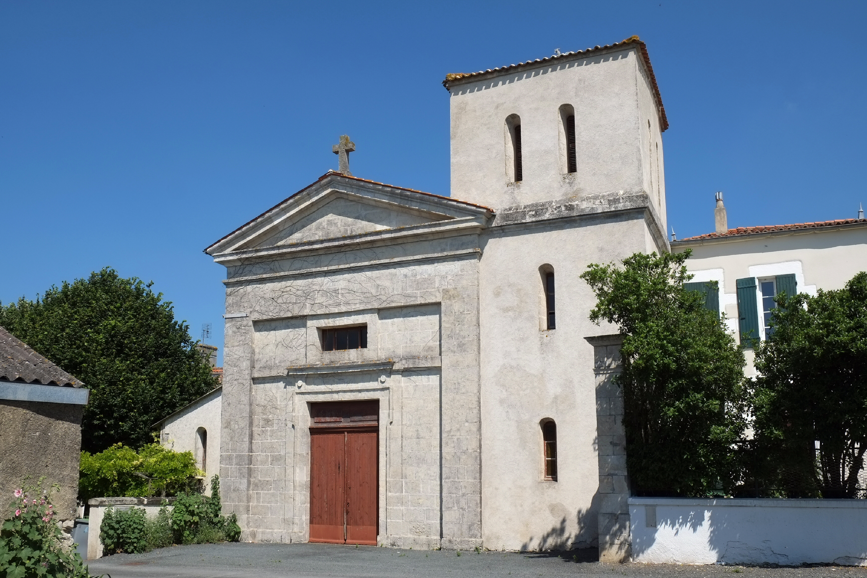 Église Saint-Cyriaque Saint-Cyr-du-Doret Charente-Maritime France